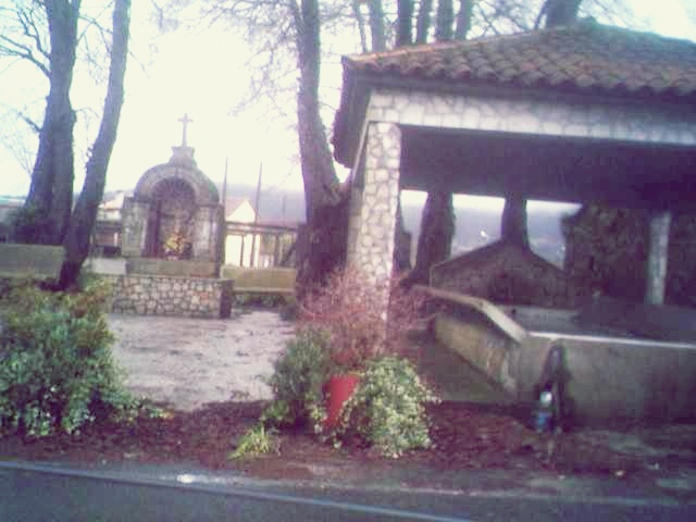 Lavadoiro e a imaxe Monserrat patrimonio da Casiña